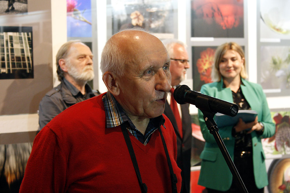 Zdzisław Świeca (2019)